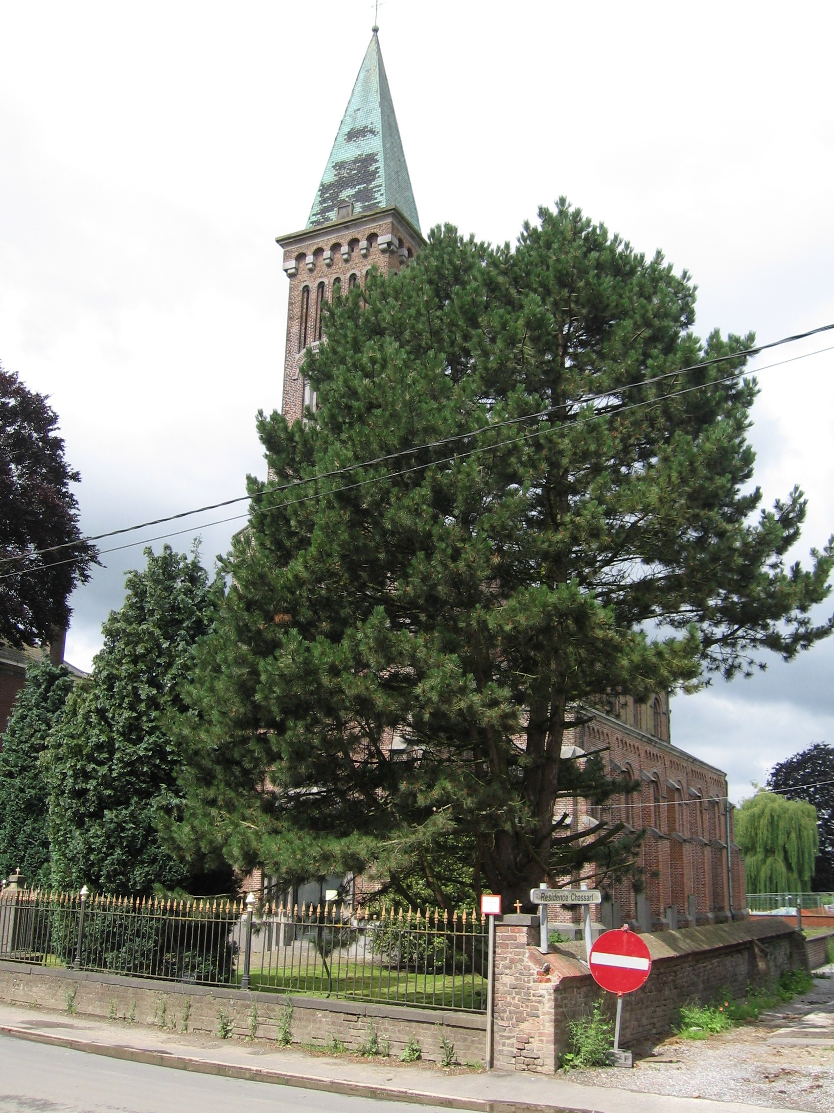 Église paroissiale Sainte-Gertrude, à Wagnelée (Belgique)